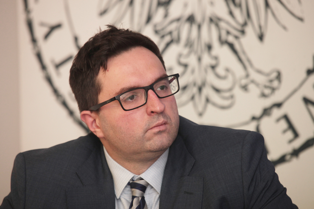 Zdjęcie z promocji książki „Protokoły konferencji polskich ojców soborowych. Zbiór dokumentów” – Warszawa, 24 czerwca 2019